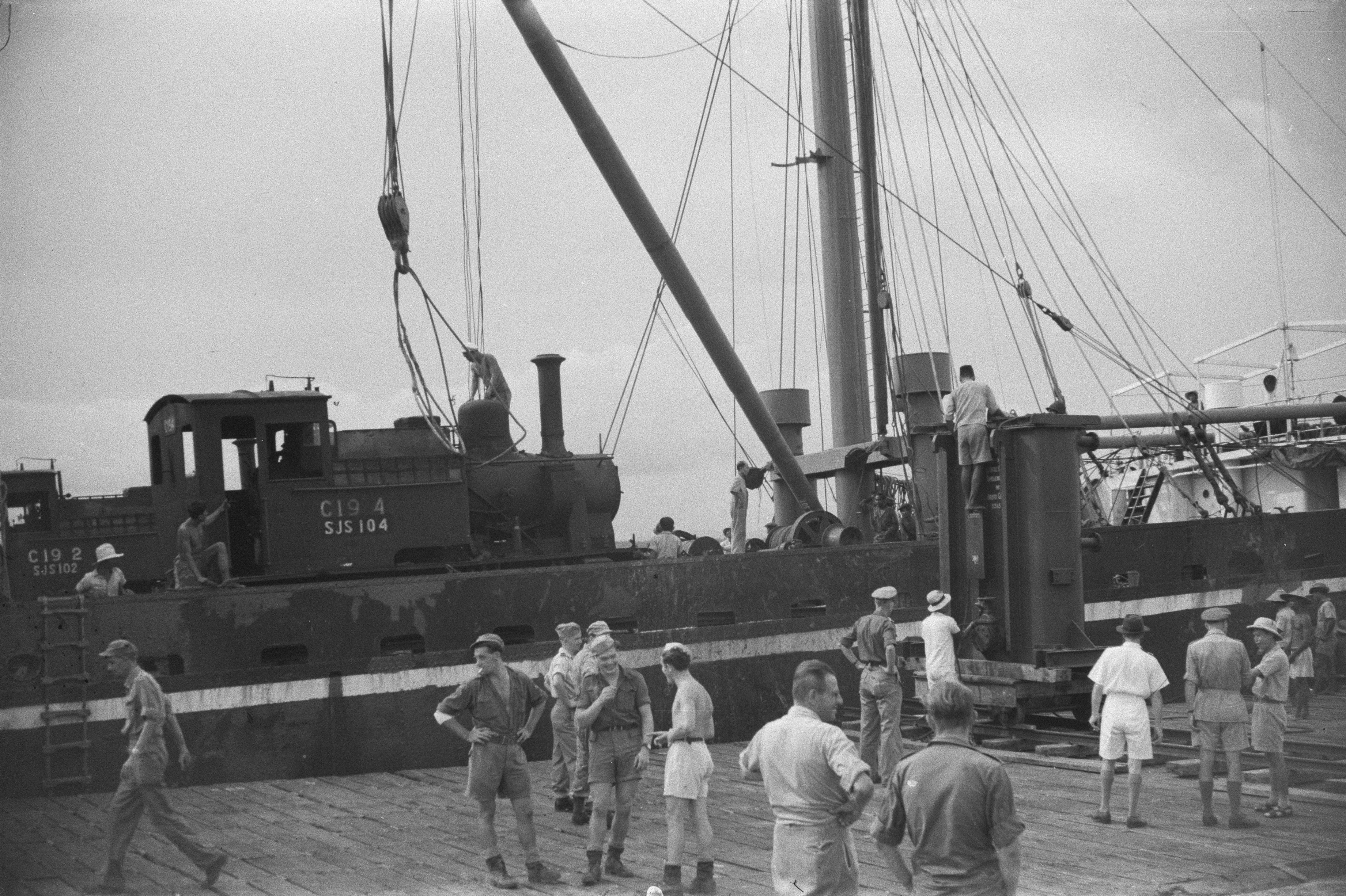 Collectie / Archief : Fotocollectie Dienst voor Legercontacten Indonesië Reportage / Serie : [DLC] Banjoemas, Chinese controle-commissie. Haven Tjilatjap. Waranedja Beschrijving : Tjilatjap: Locomotieven voor de spoorwegen, transformators voor de krachtinstallaties, kostbare lading voor het zich herstellende Indonesie. Te zien is loc C19 4 (SJS 104). Datum : 10 oktober 1947 Locatie : Indonesië, Nederlands-Indië Fotograaf : Taillie, J.C. / DLC Auteursrechthebbende : Nationaal Archief Materiaalsoort : Negatief (zwart/wit) Nummer archiefinventaris : bekijk toegang 2.24.04.03 Bestanddeelnummer : 386-2-3